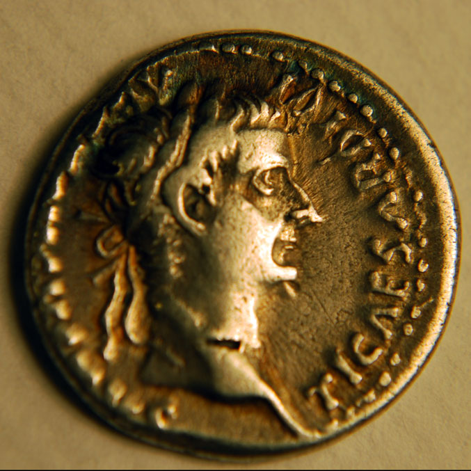 Изображение Тиберия на монете с сайта